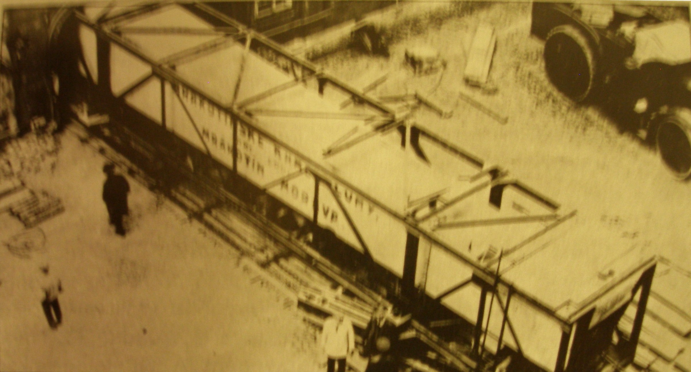 Příjezd obelisku na Pražský hrad (rok 1928).